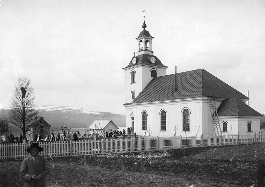 People outside Klövsjö church, built in wood in 1795-1797, overlooking lake Klövsjö. Människor utanför Klövsjö kyrka, som byggdes av trä 1795-1797, ovanför Klövsjön. Parish (socken): Klövsjö Province (landskap): Jämtland Municipality (kommun): Berg County (län): Jämtland Photograph by: N. Thomasson Date: c. 1900 Format: Print Persistent URL: Read more about the photo database (in english)